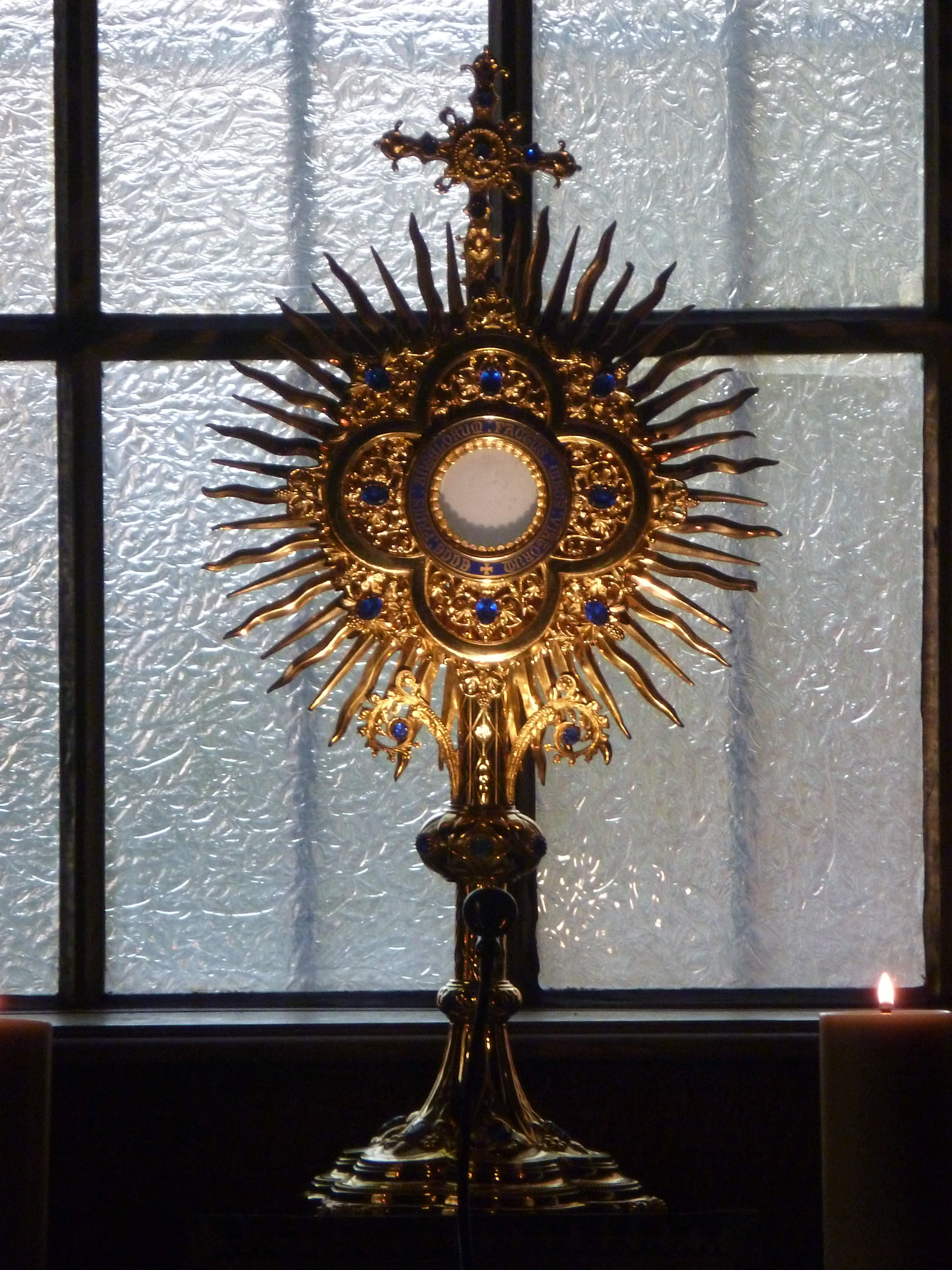 Ostensoir et Saint-Sacrement de l’église Saint-Aloyse à Strasbourg.